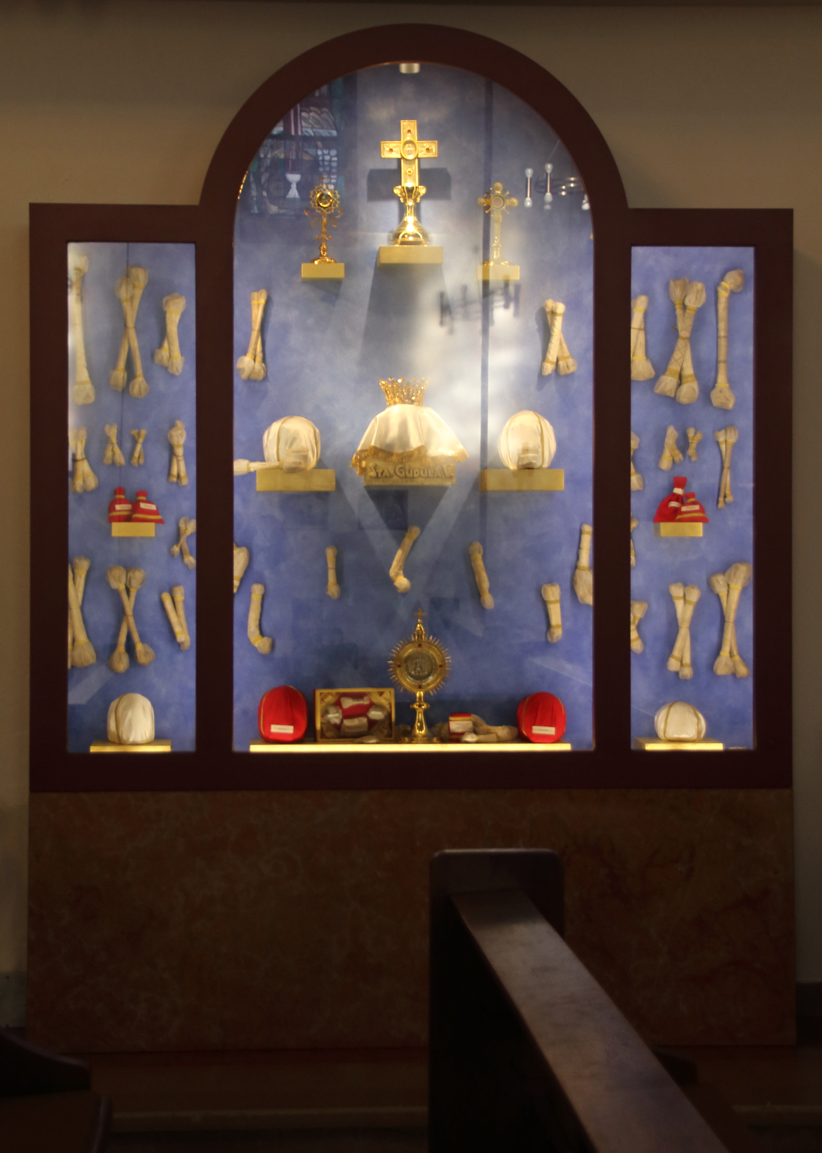 Eibinger Reliquienschatz. Vitrine aus dem Jahr 2012 nach Entwurf des Künstlers Thomas Hillenbrand aus Ilshofen. Kirche St. Hildegard (Eibingen), Rüdesheim am Rhein, Hessen.